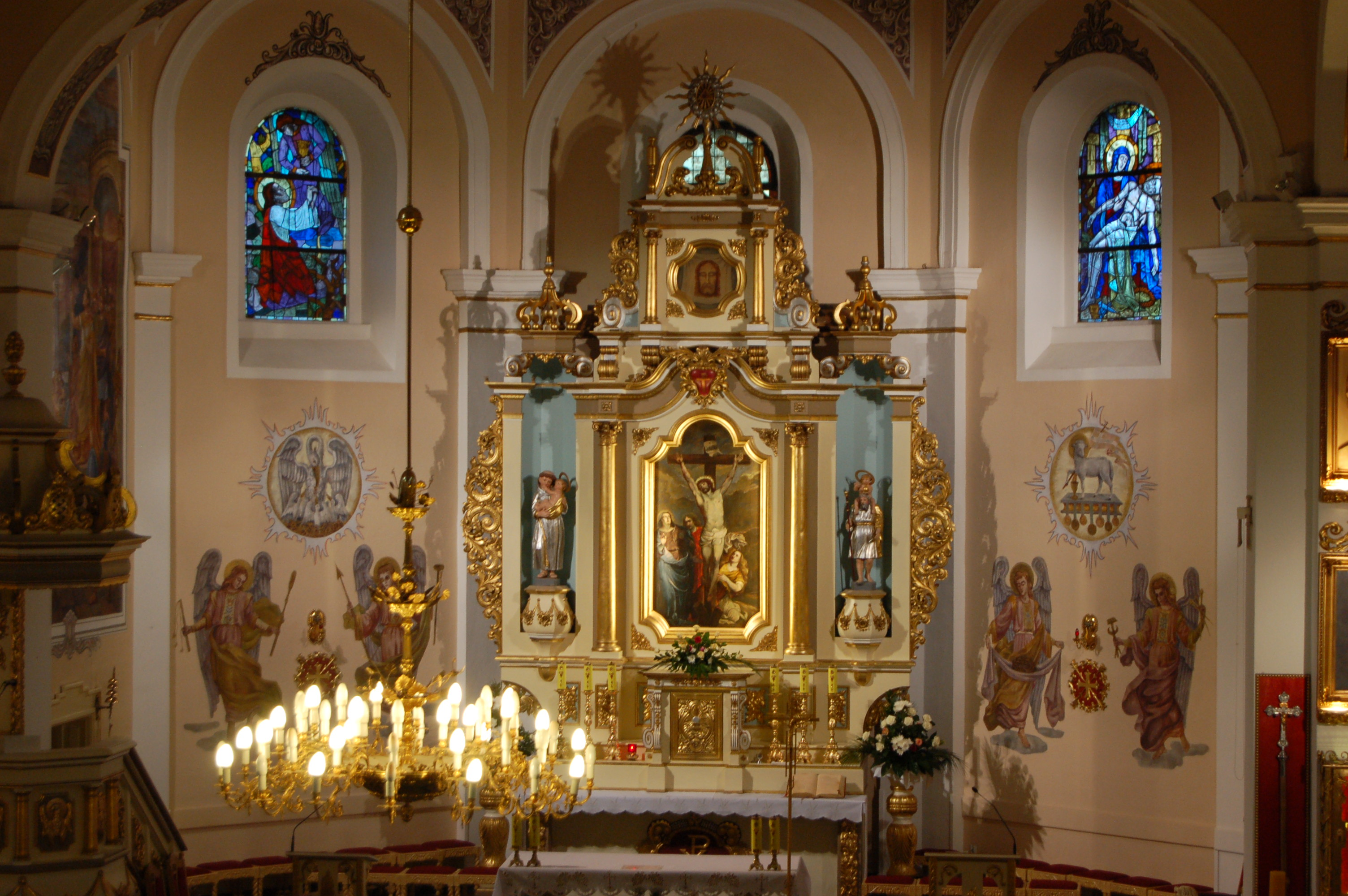 Prezbiterium kościoła św. Krzyża w Rumi